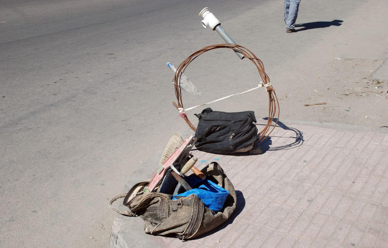 Dakhla, Westsahara. Werkzeuge von Tagelöhnern